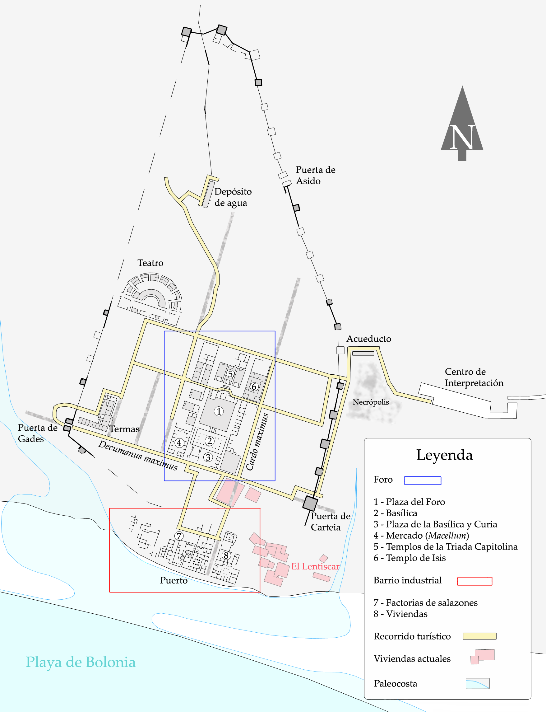 Plano del yacimiento de Baelo Claudia en la ciudad andaluza de Tarifa, España. Se indican los principales edificios y espacios excavados de la ciudad, visitables en la actualidad, y el trazado de las murallas indicándose en negro los restos visibles, en gris los restos de muralla y torres conocidas y con línea discontínua la línea aproximada de la muralla en la zona en la que ésta no aparece o no se ha localizado. Se indica igualmente el trazado aproximado de la costa en el siglo I (paleocosta).